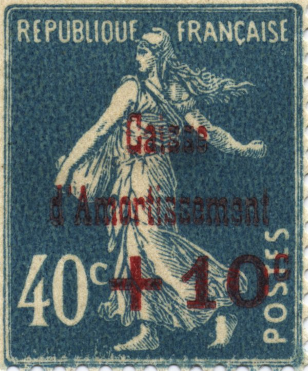 Type Semeuse camée, série Amortissement, 40 c. + 10 c.